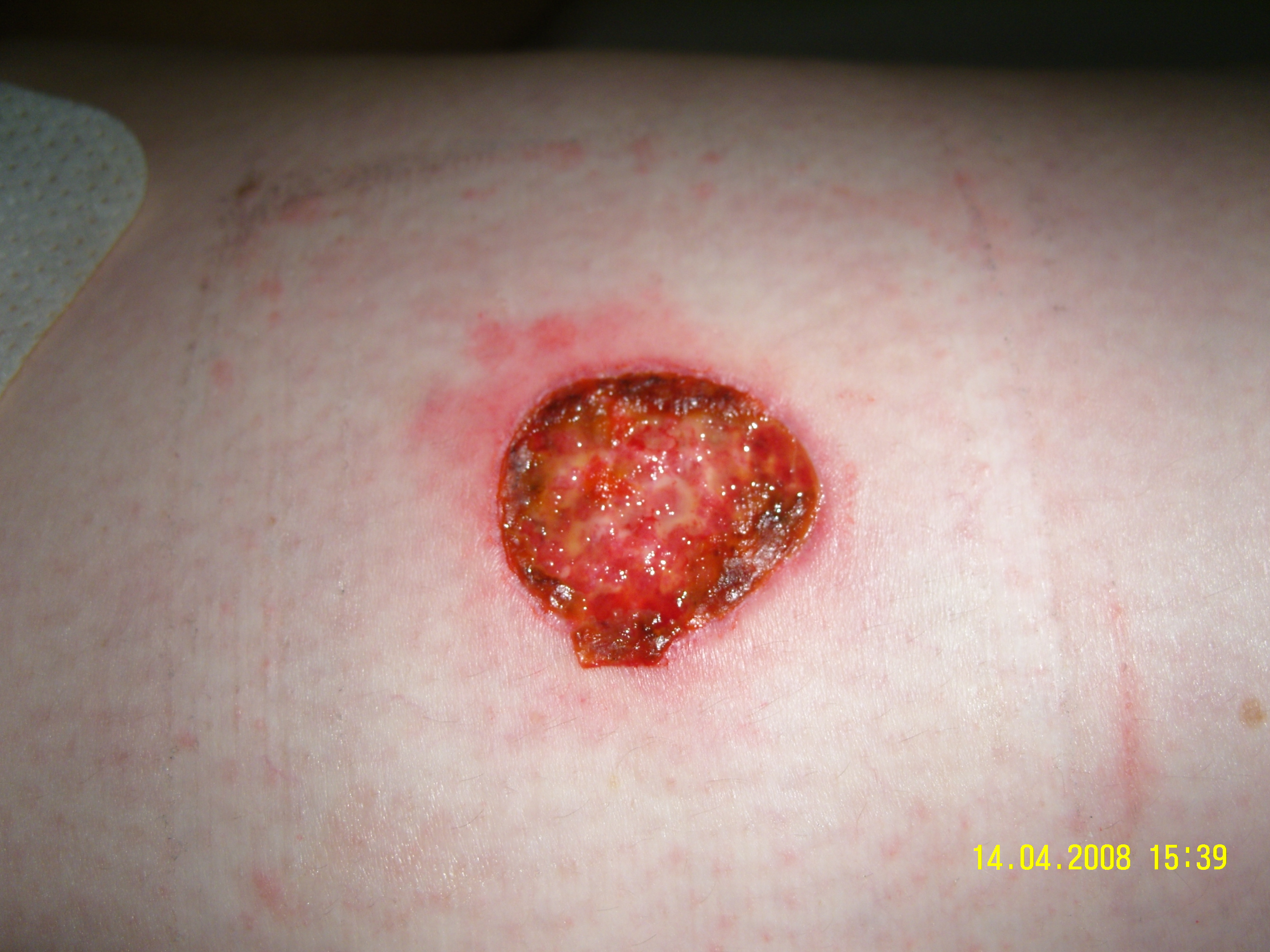 Emplacement d'un prélèvement cutanée pour greffon